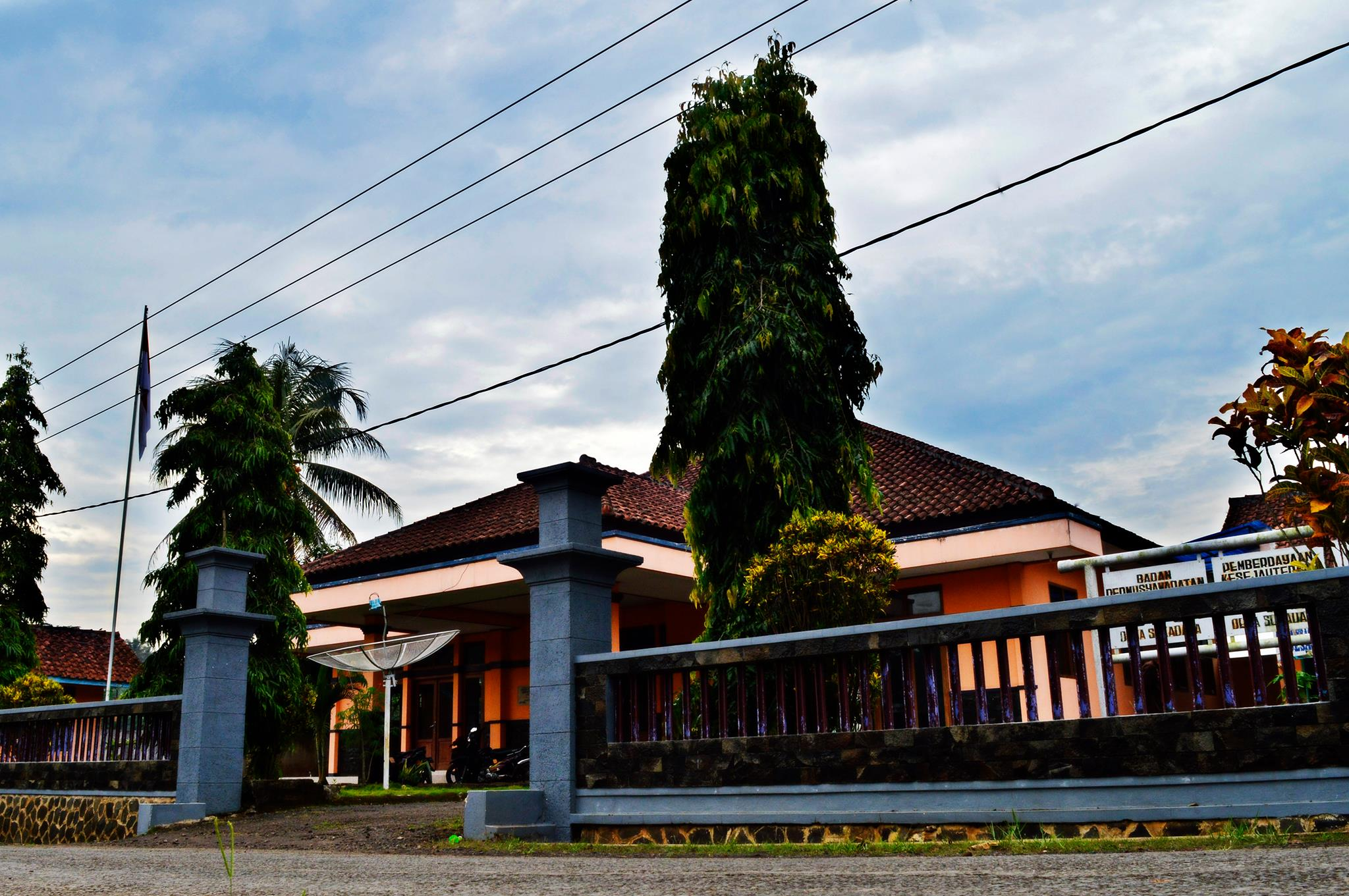 Foto Bale Desa Sukadana